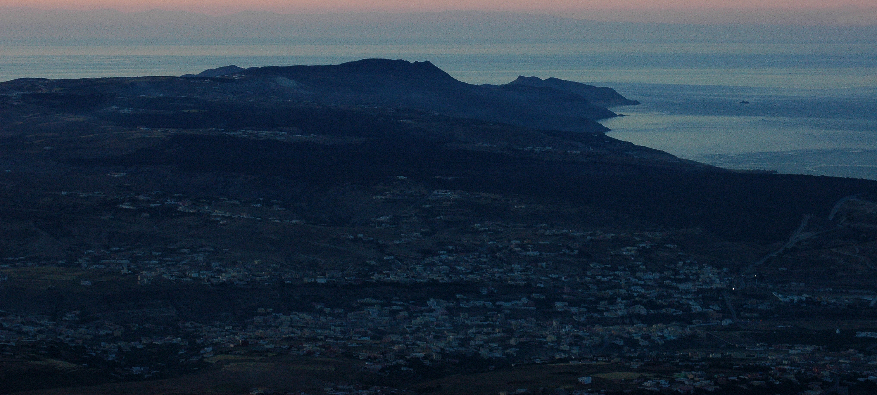 Cabo de Tres Forcas, al atardecer, desde el Gurugú